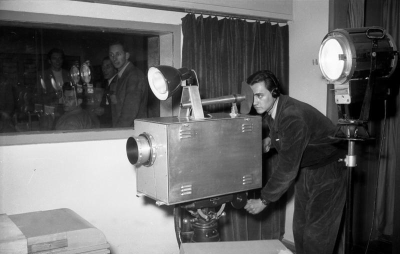 Berlin, Fernsehkamera bei Aufnahme Zentralbild/Quasch/20.12.1952/Erstes offizielles Fersehversuchsprogramm der DDR beginnt am 21.12.1952 Am 21.12.1952 wird das erste Fernsehzentrum unserer Republik in Berlin-Adlershof mit der Sendung des offiziellen Fernsehversuchsprogramms beginnen. Zum Programm des Fernsehfunks gehören die Sendereihen "Die aktuelle Kamera", "Wetterdienst", "Sport der Woche", "Nationales Forum", "Modeschauen" und Kulturprogramme. Der Ausbau der Sendesäle und Studios ist noch lange nicht abgeschlossen, allein der gesamte technische Teil des Fersehzentrums soll bis 1955 verdoppelt werden. UBz: Die Fernsehkamera im Ansageraum bei der Aufnahme.